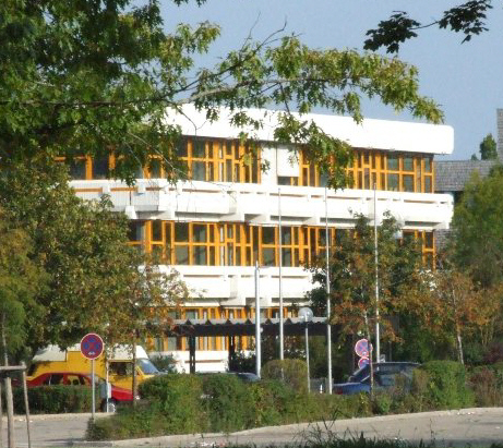 Berufsbildungszentrum Jakob Küner in Memmingen